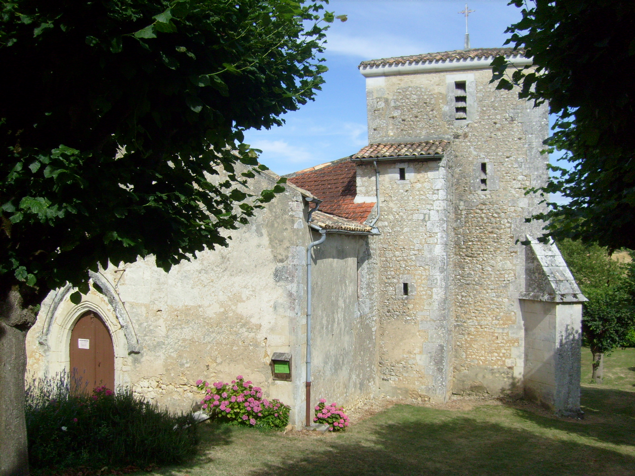 Église Saint-Saturnin de Saint-Sorlin-de-Conac